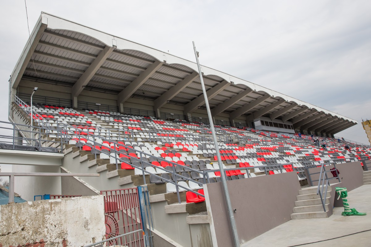 Poza reprezinta tribuna renovata a stadionului municipal Sibiu.